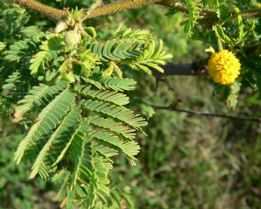 Acacia tortuosa, branche, feuilles, glomérule, Guadeloupe